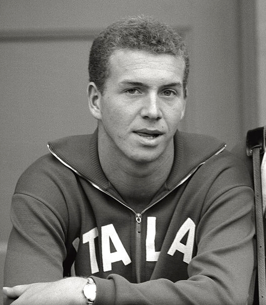 Klaus Dibiasi, 1964 Olympics